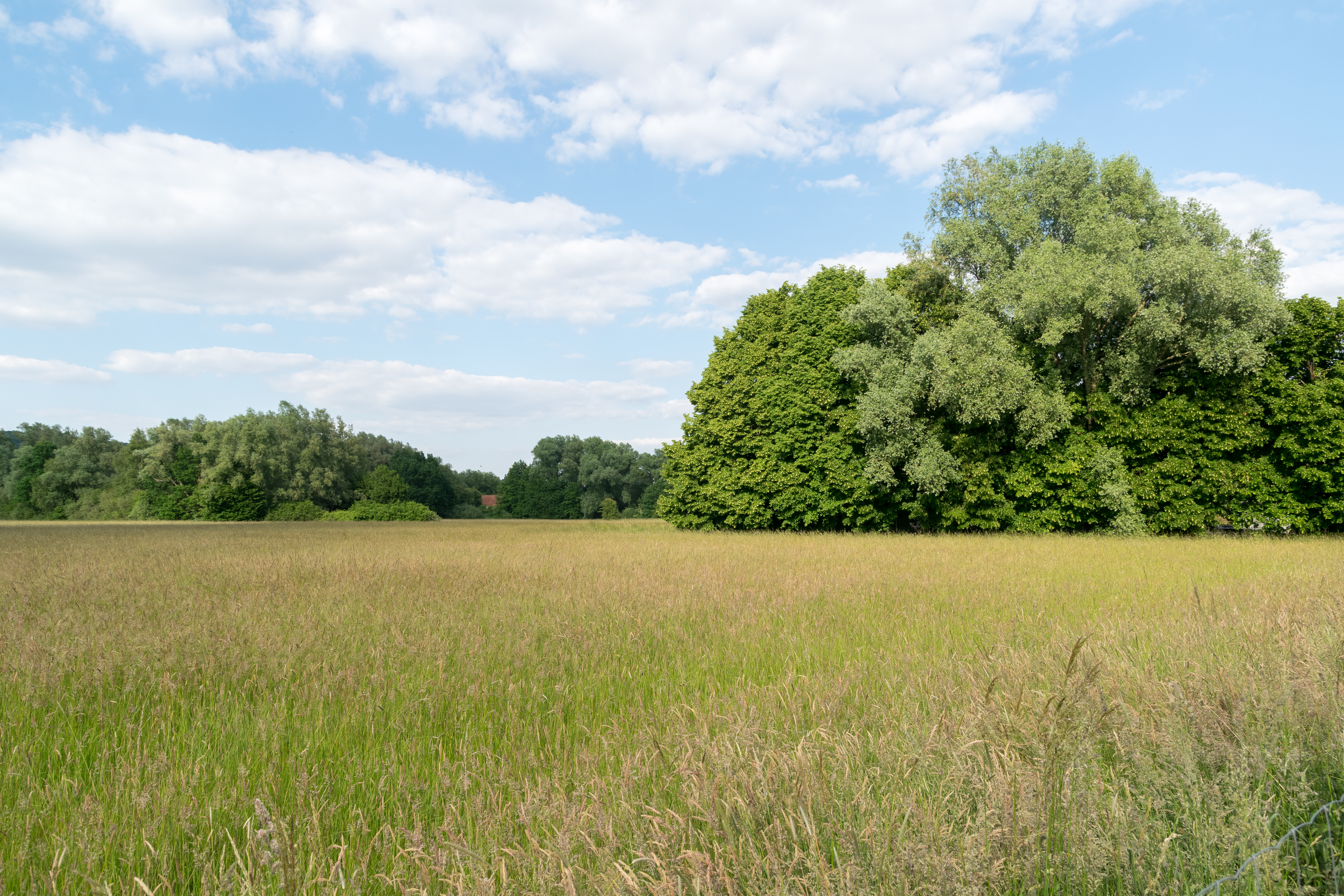 Naturschutzgebiet In der Masch, Bad Salzuflen, Kreis Lippe